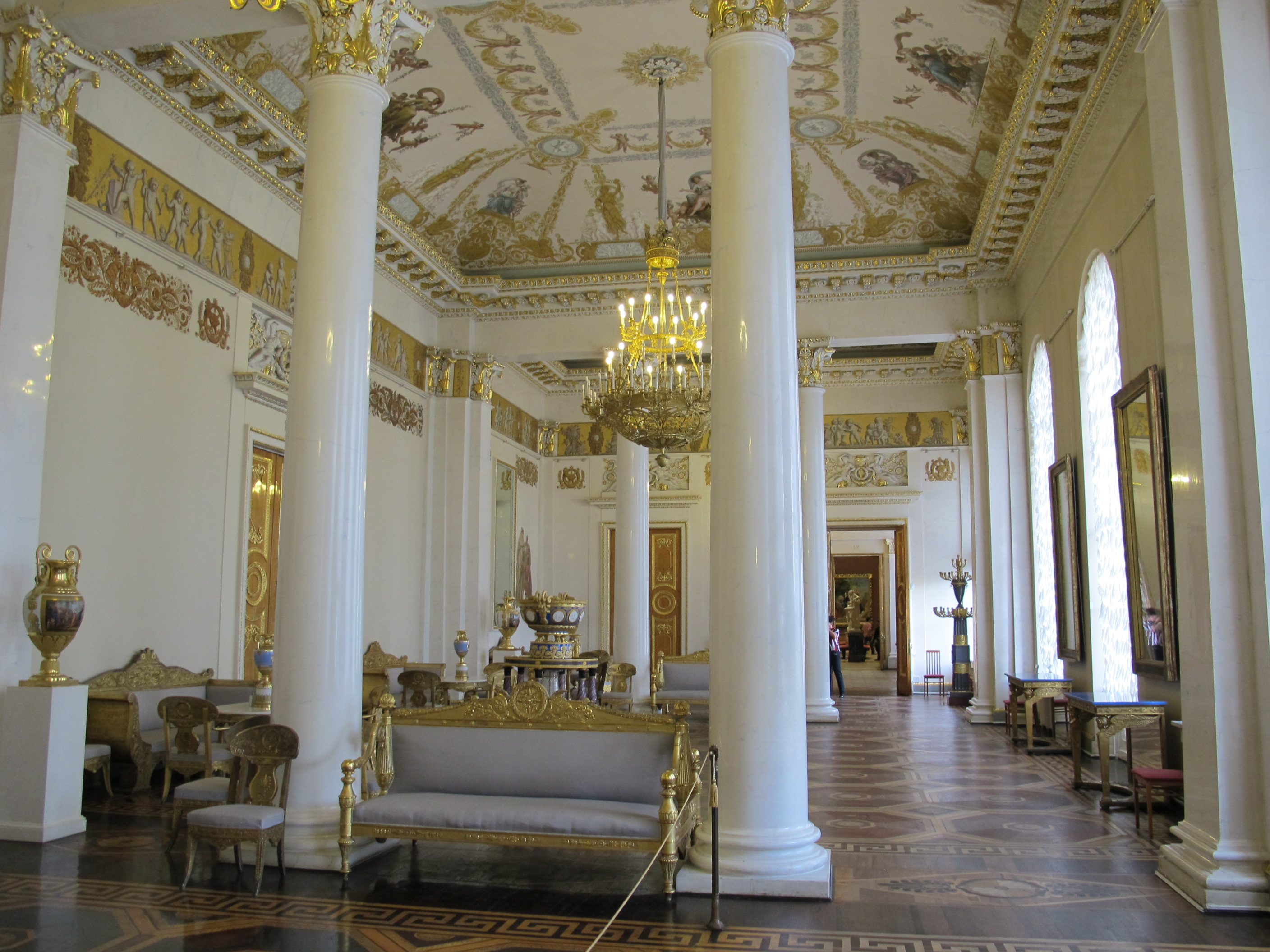 Museo russo, sala